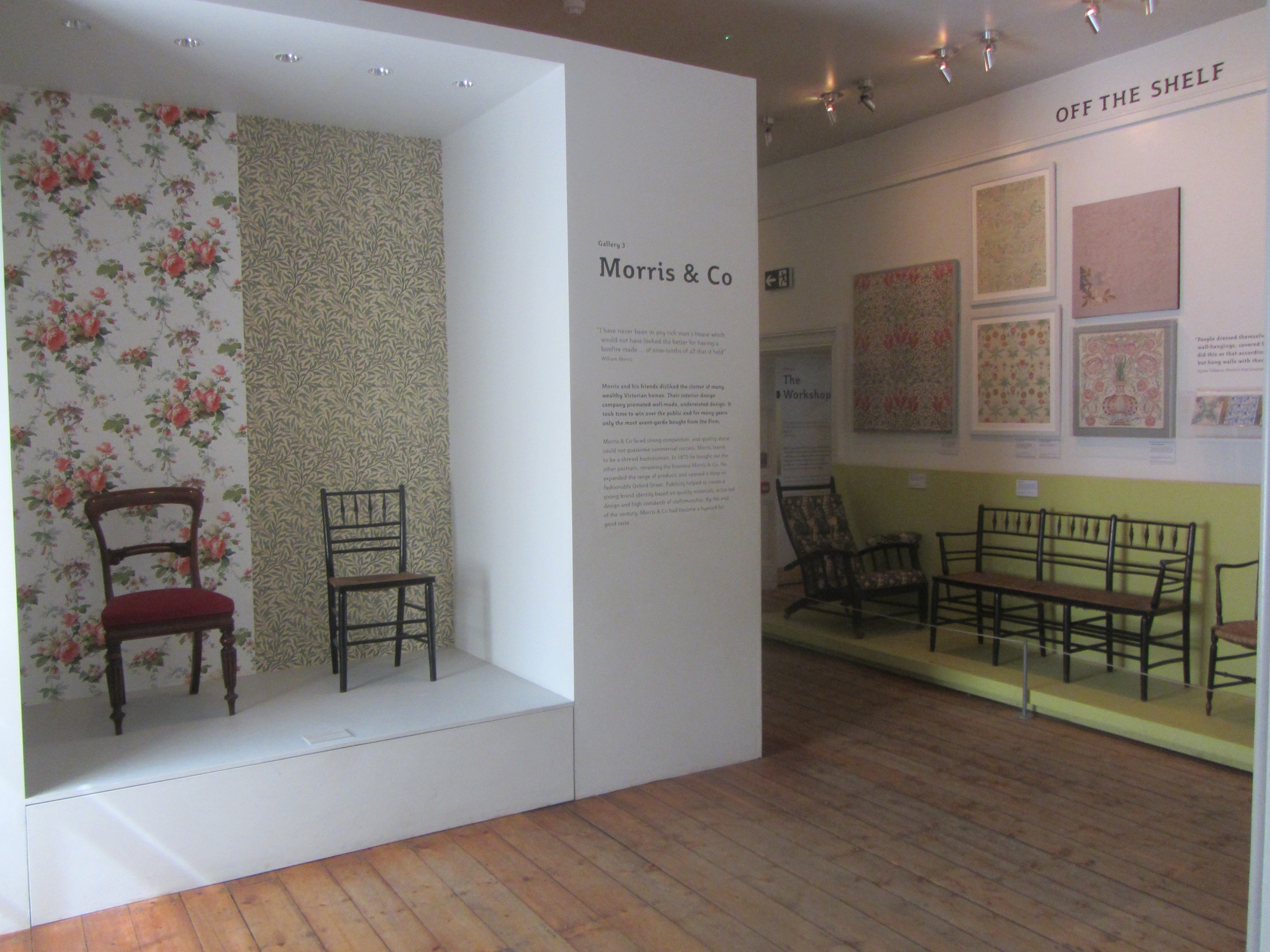 The Morris & Co Room at the William Morris Gallery